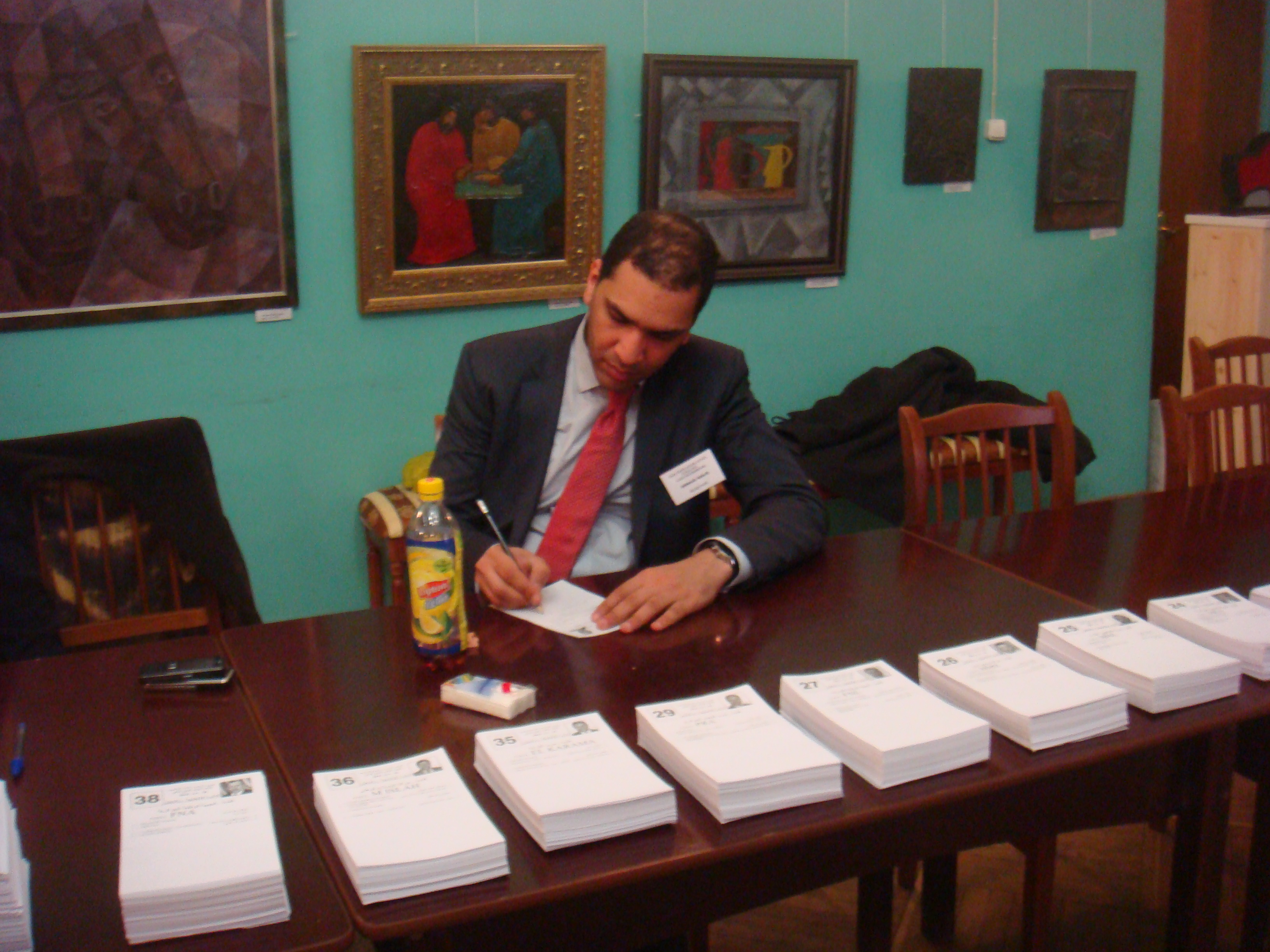 Élections législatives algériennes le 6 mai 2012 en Russie dans le bureau de Saint-Pétersbourg, situé à la Maison des Nationalités, Mokhovaya ulitsa 15.